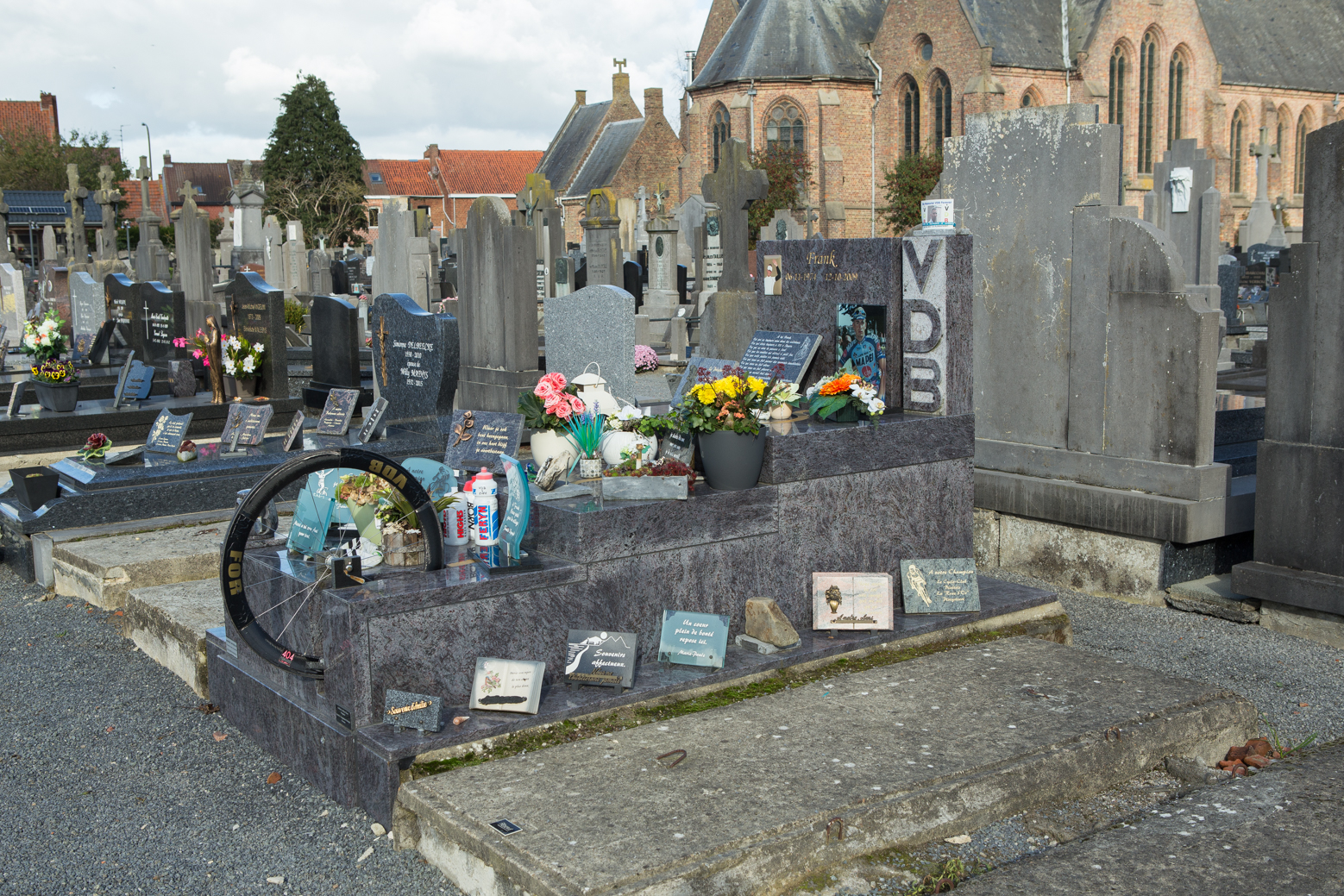 Graf van F. Vandenbroucke